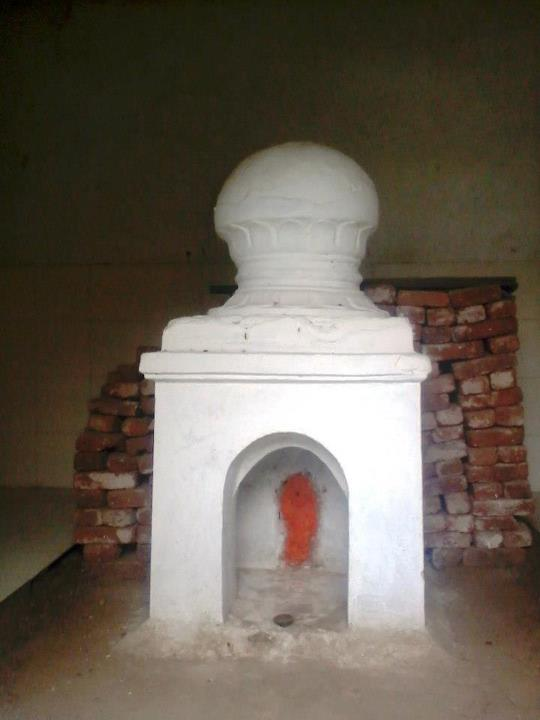 भोळाराम स्वामी यांची समाधी अचलपूर